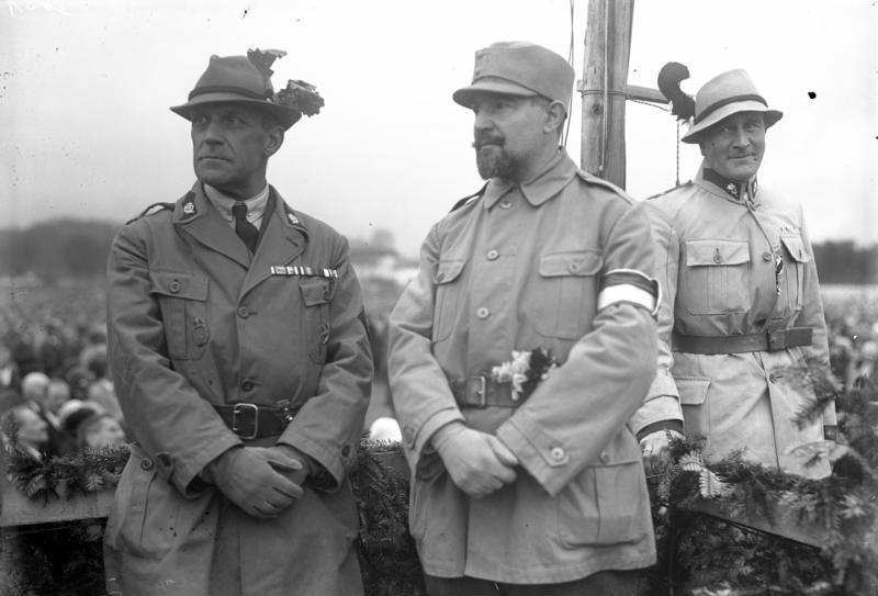 Der Führer der oesterreichischen Heimwehren Bundesrat Steidle zurückgetreten! Der Führer der oesterreichischen Heimwehren Bundesrat Steidle (Mitte) mit seinen beiden Mitarbeitern Kommandant Baron Prangh (rechts) und der zweite Bundesführer Baron von Bachofen-Esch (Links). Information added by Wikimedia users.Die richtige Schreibweise der Namen ist Baron Hans Pranckh und Bachofen-Echt